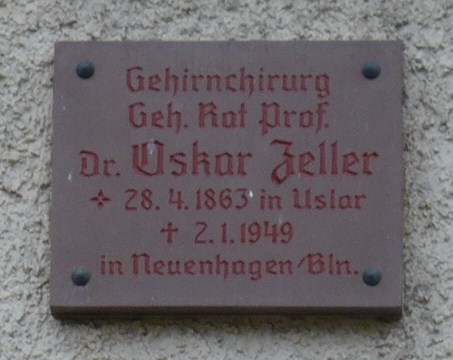 Schild Zeller am Haus Zeller Uslar